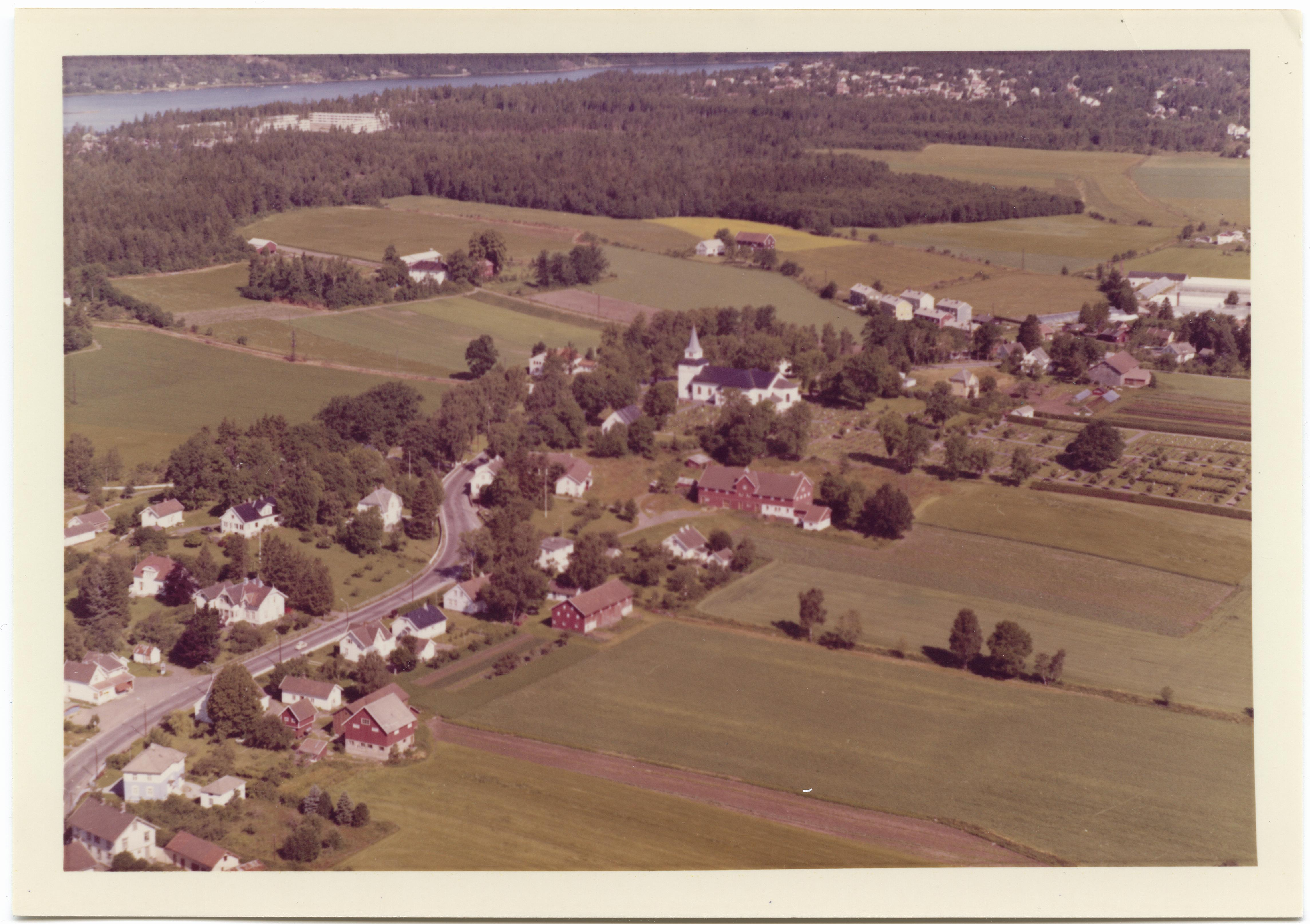 WF.S.185182